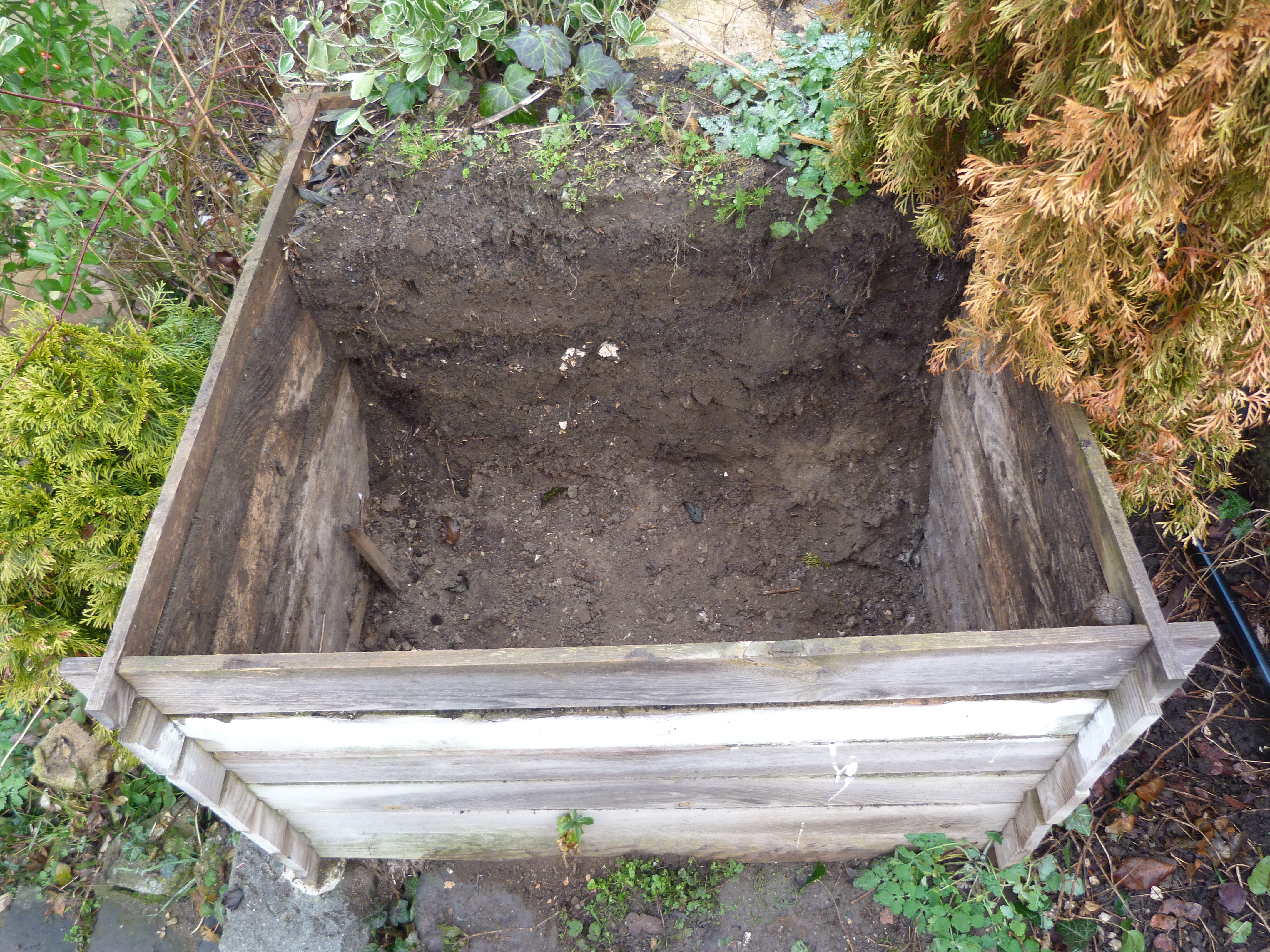 Komposztáló Budán. A háztartási hulladékkal megtöltött komposztáló 3 év érés után. A félig kitermelt komposztálóban látható rétegrendben az eredeti konyhai hulladékból csak kevés tojáshéj maradt még meg